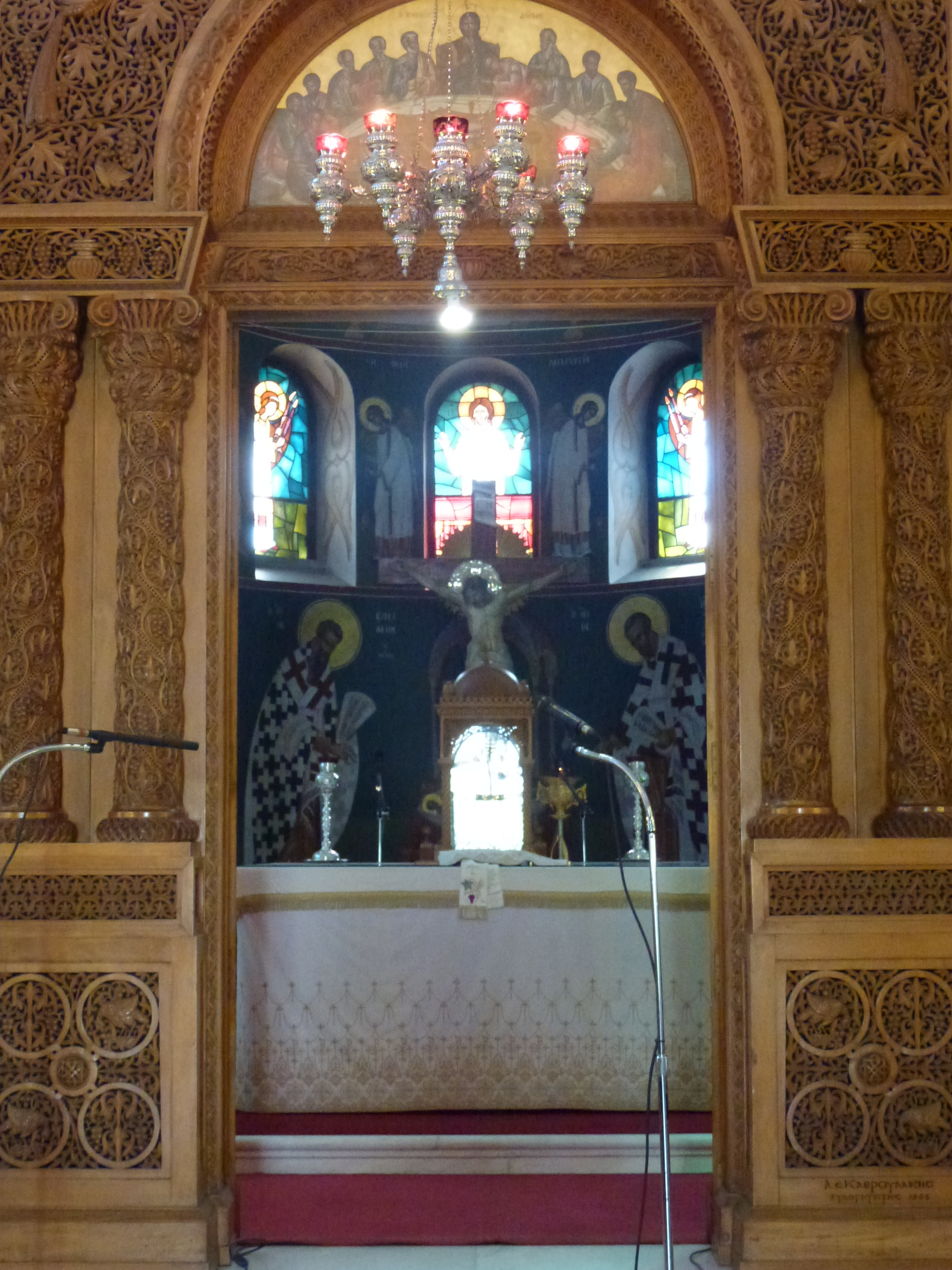 Die geöffnete Königliche Tür gibt den Blick frei in den Altarraum